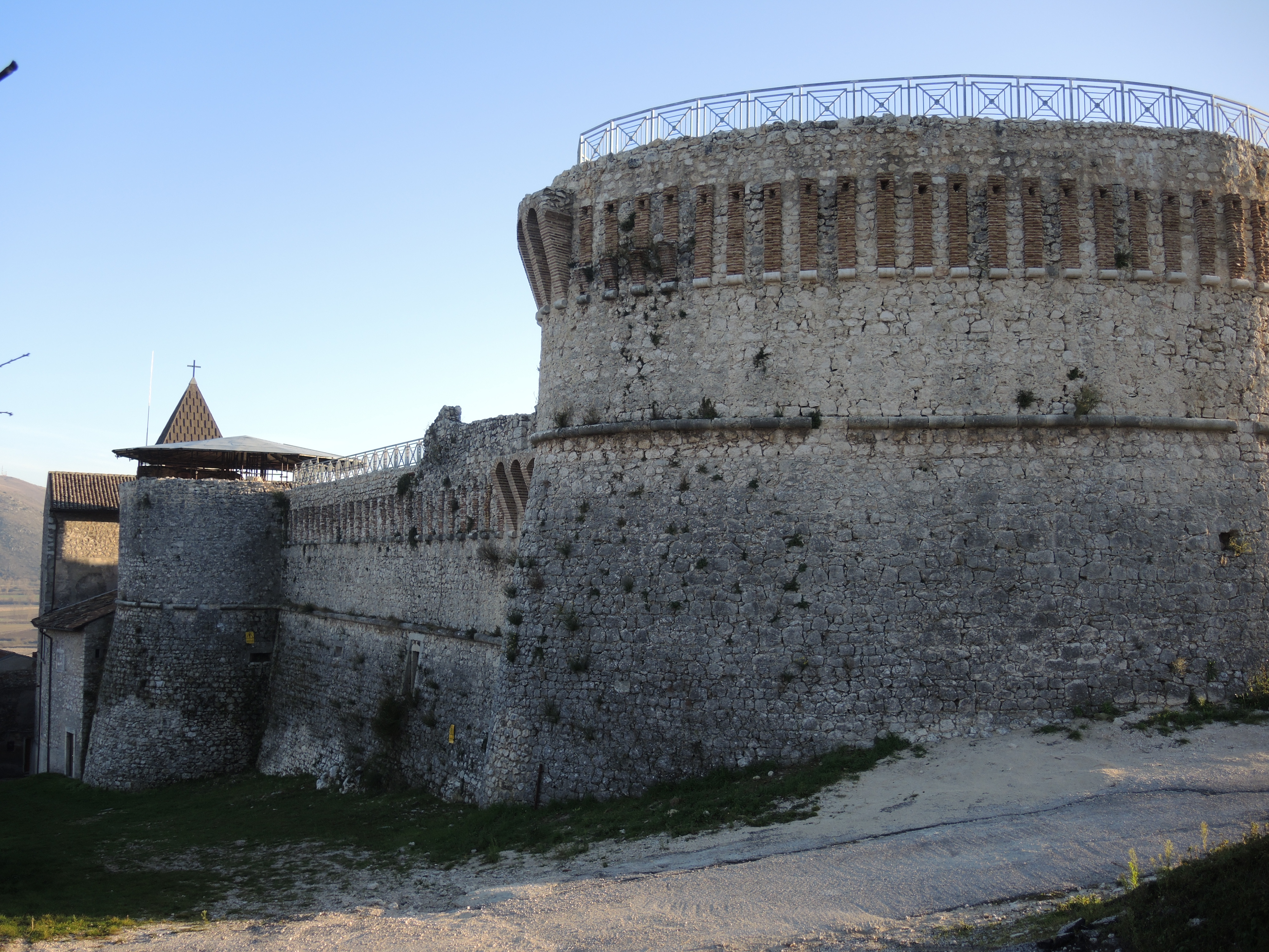 Rocca Orsini a Scurcola Marsicana (AQ)